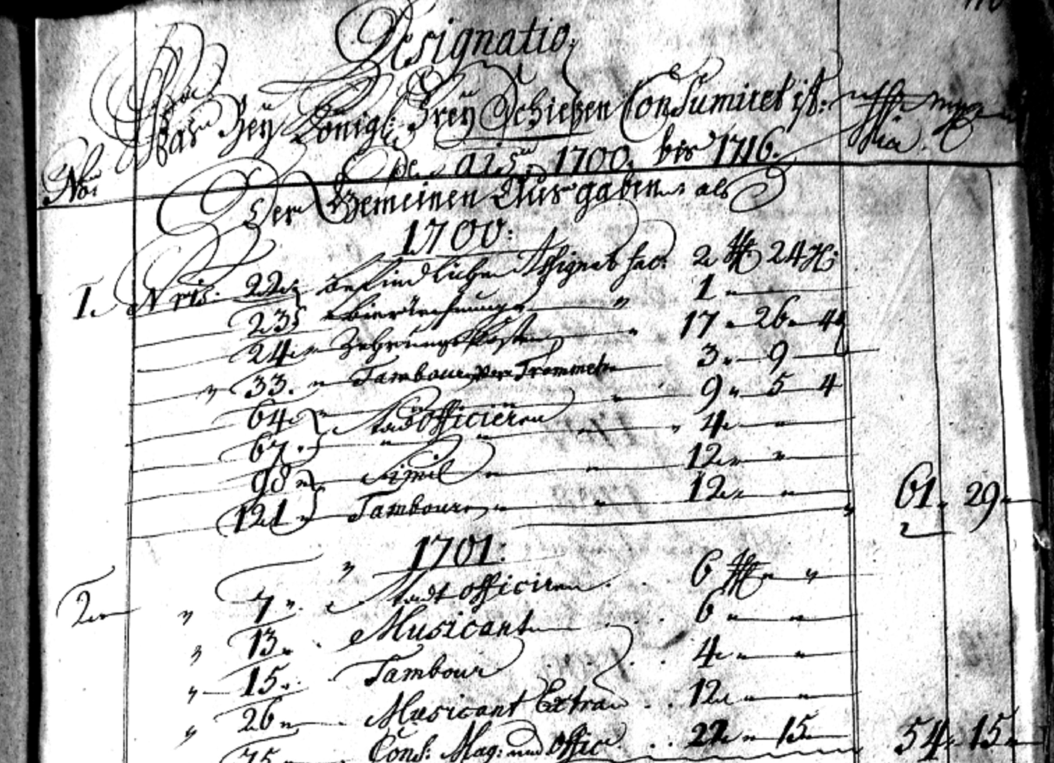 Die Kostenverteilung für das Tambourkorps der Stadt Minden in den Jahren 1700 und 1701